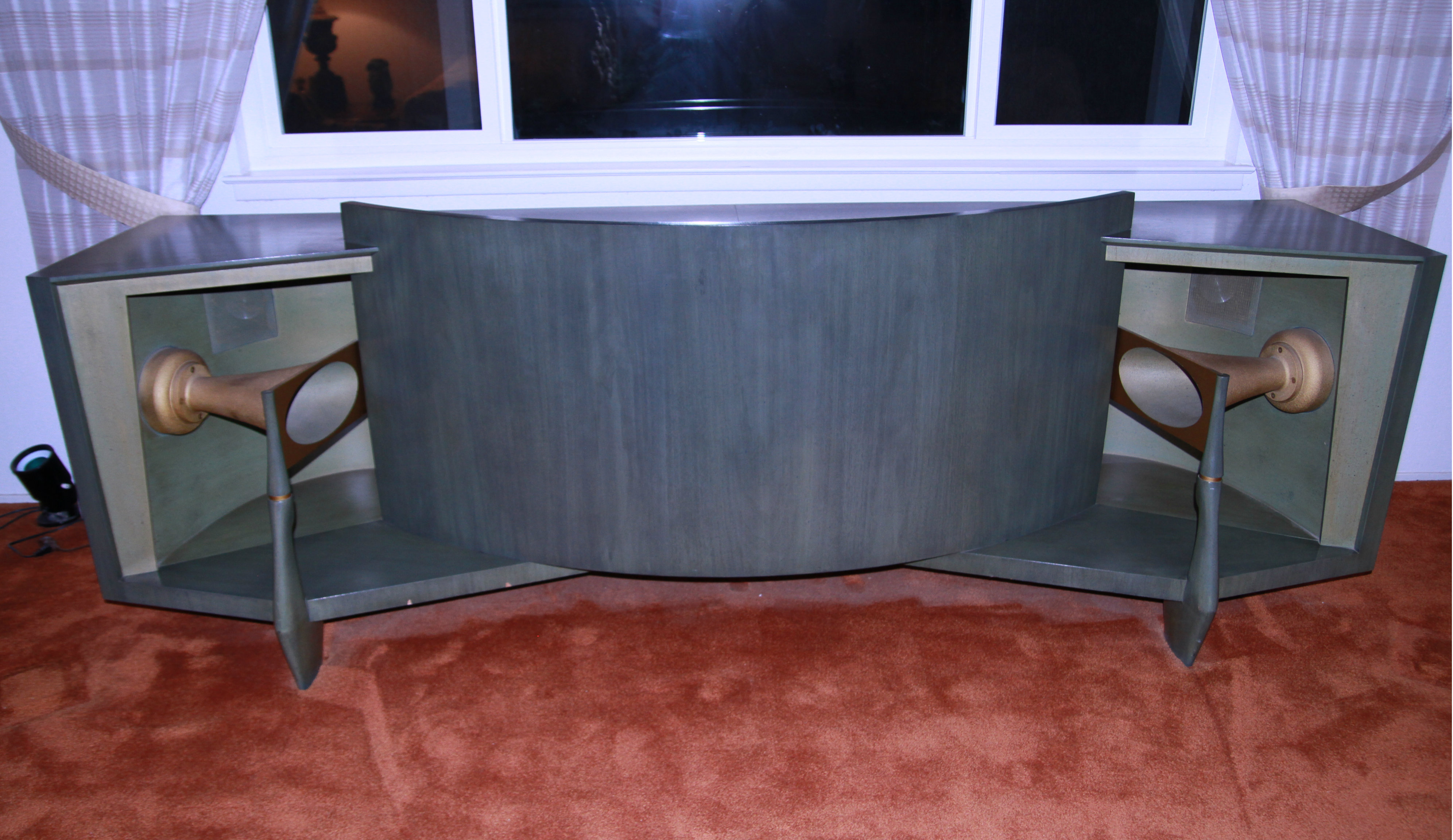 JBL D44000 Paragon © 2010 Michael W. Pretzer